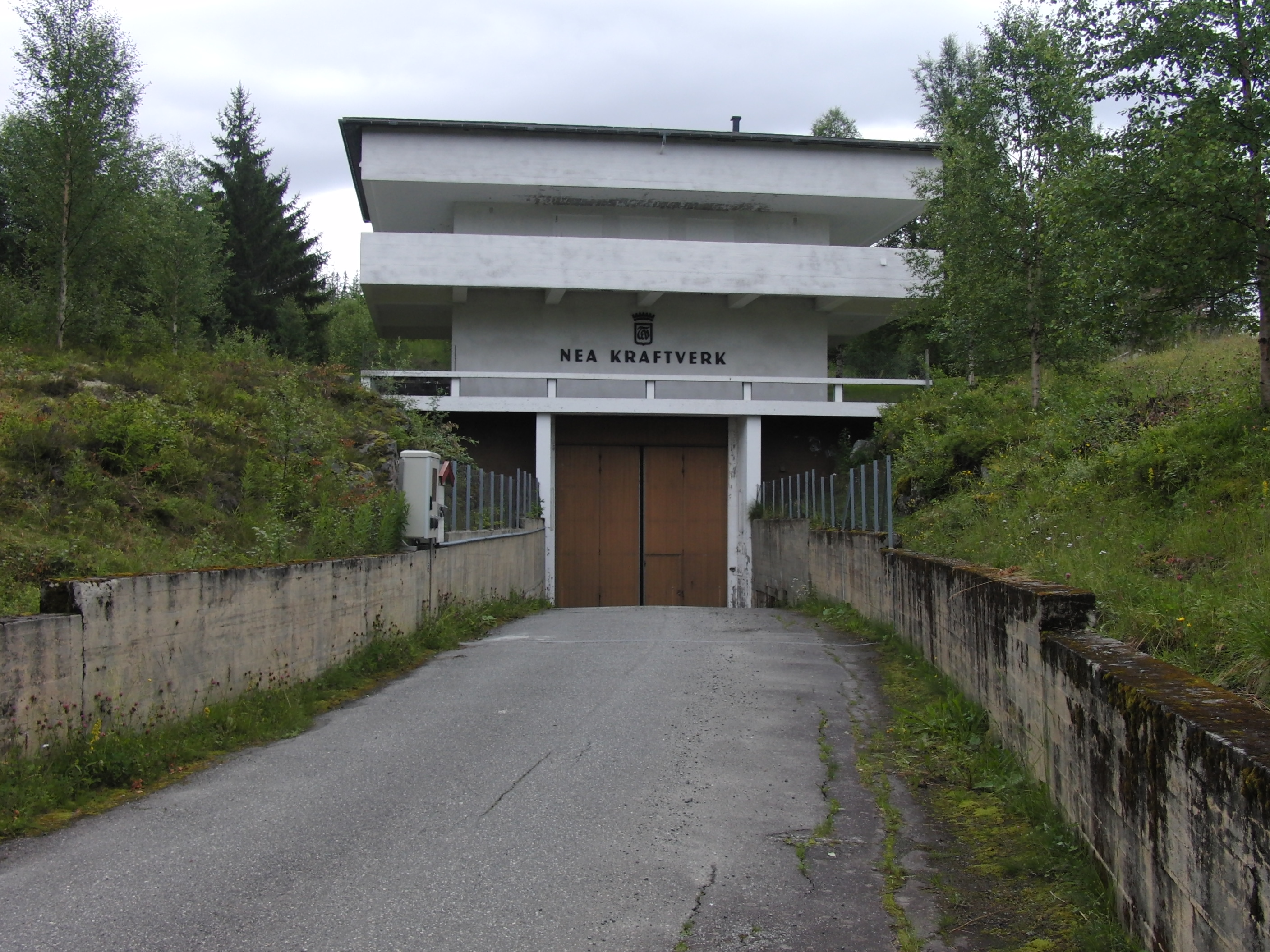 Nea kraftverk / Tya kraftverk